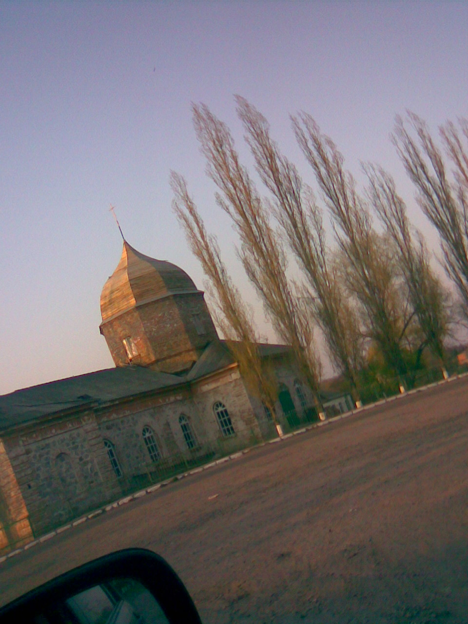 Храм Покрови у селі Лиса Гора: Храм Покрови у селі Лиса Гора